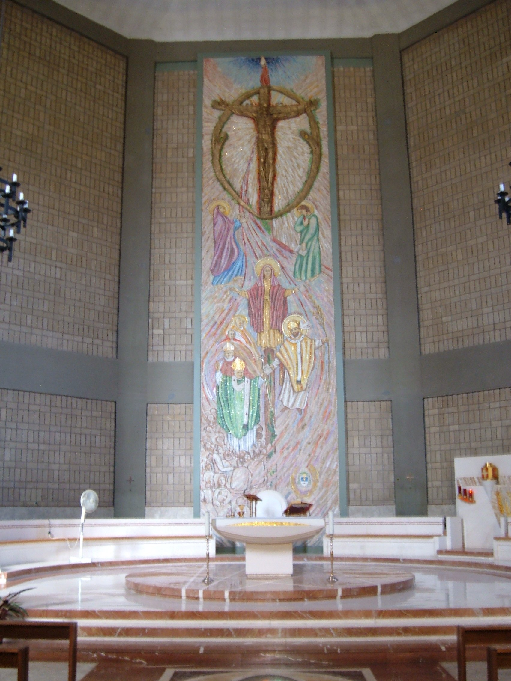 Chiesa di Santa Silvia, a Roma, nel quartiere Portuense. Mosaico absidale, inaugurato nel giugno 2008.